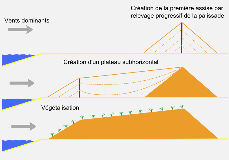 Technique utilisée pour l'édification du cordon dunaire en Aquitaine Catégorie: Landes de Gascogne